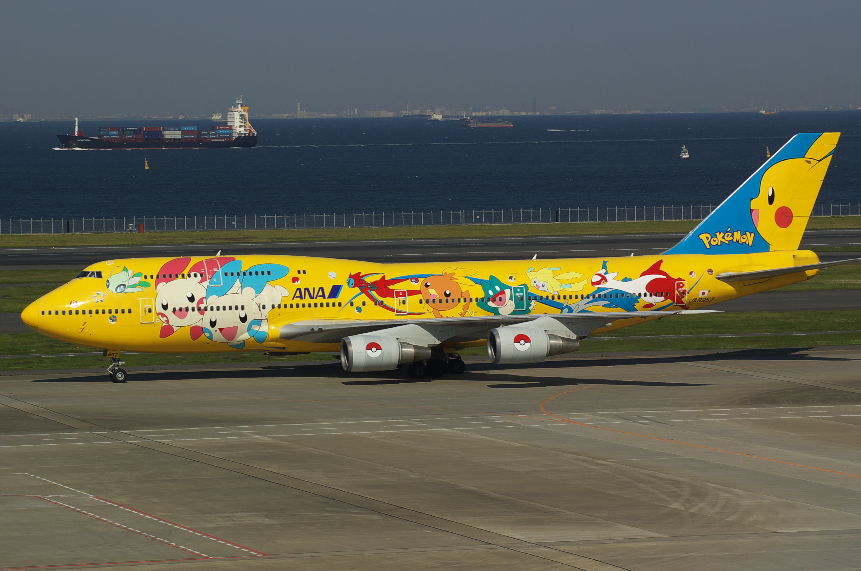 2007年4月29日 羽田空港第二ターミナル展望デッキにて撮影。 ピカチュウ・ジャンボ JA8957 747-400